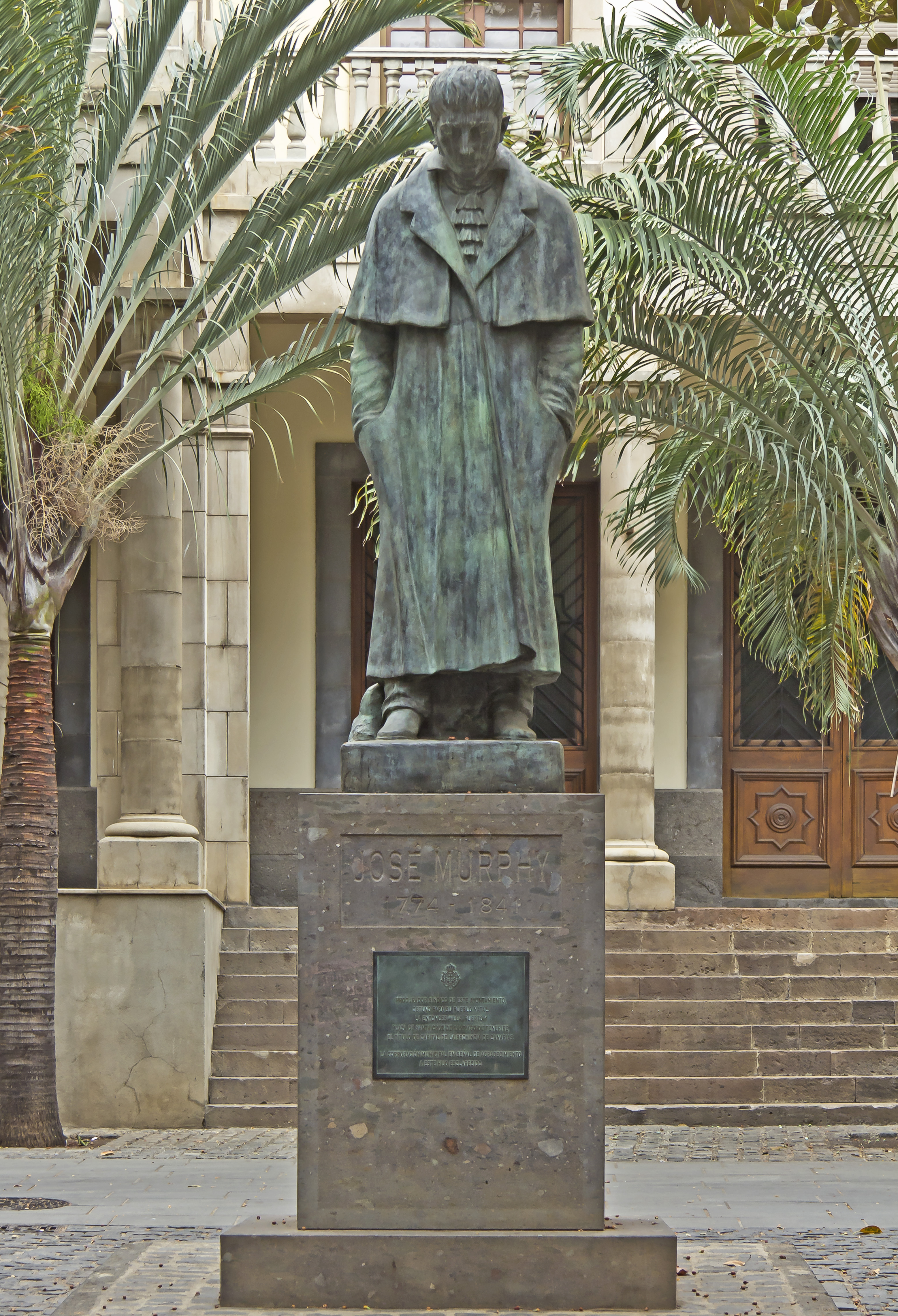 Denkmal für José Murphy auf der Plaza San Francisco in Santa Cruz de Tenerife